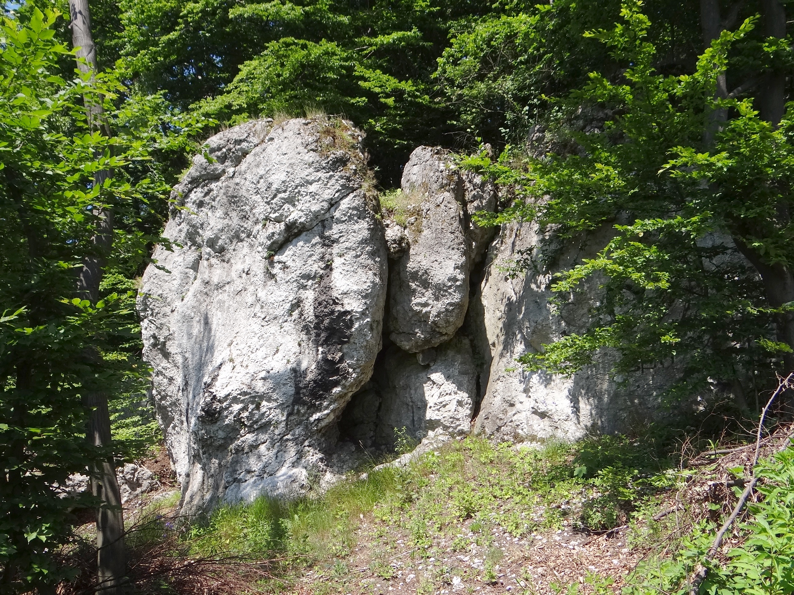 Skałki w Ryczowie